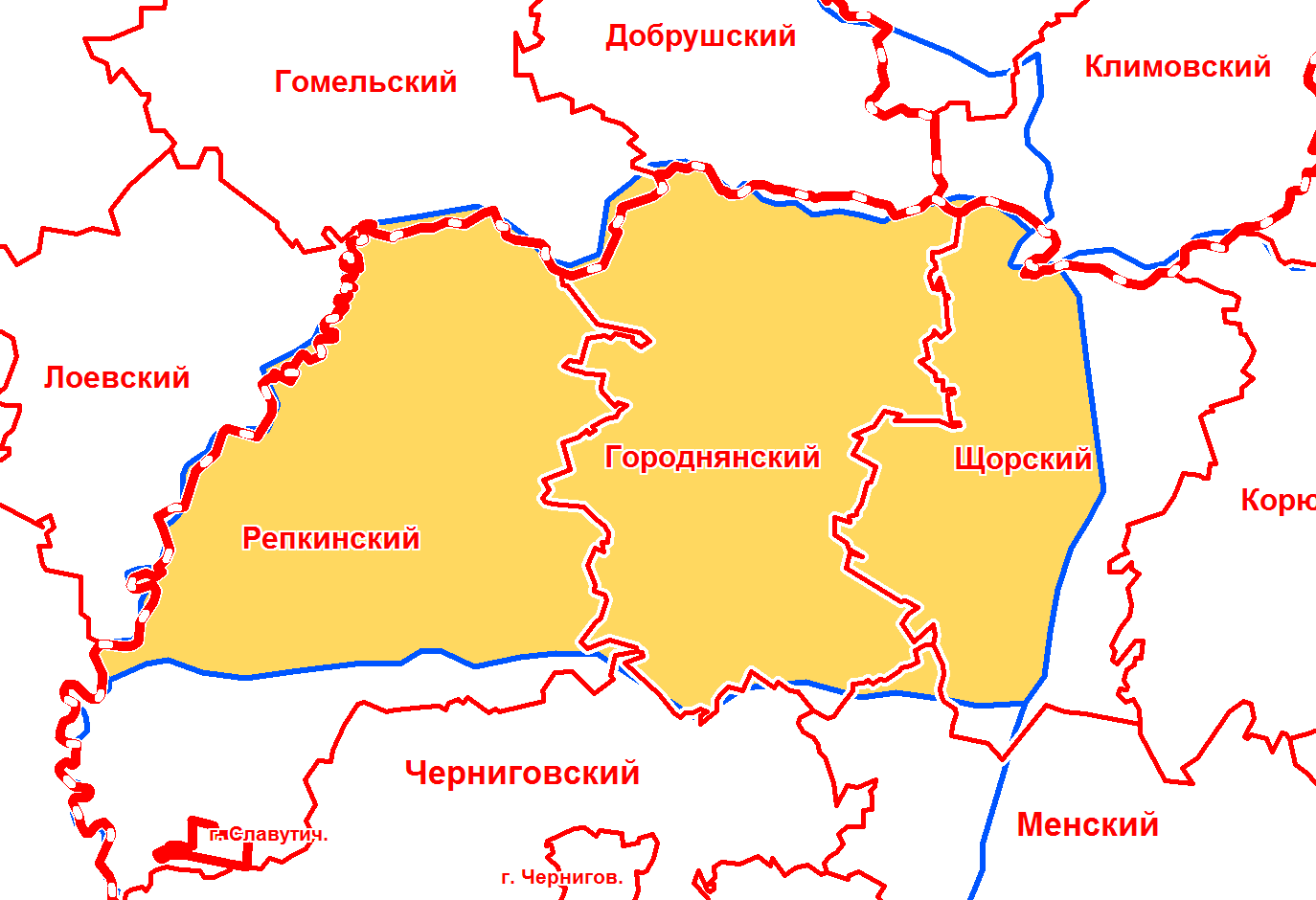 Городнянский уезд Черниговской губернии в современной сетке районов